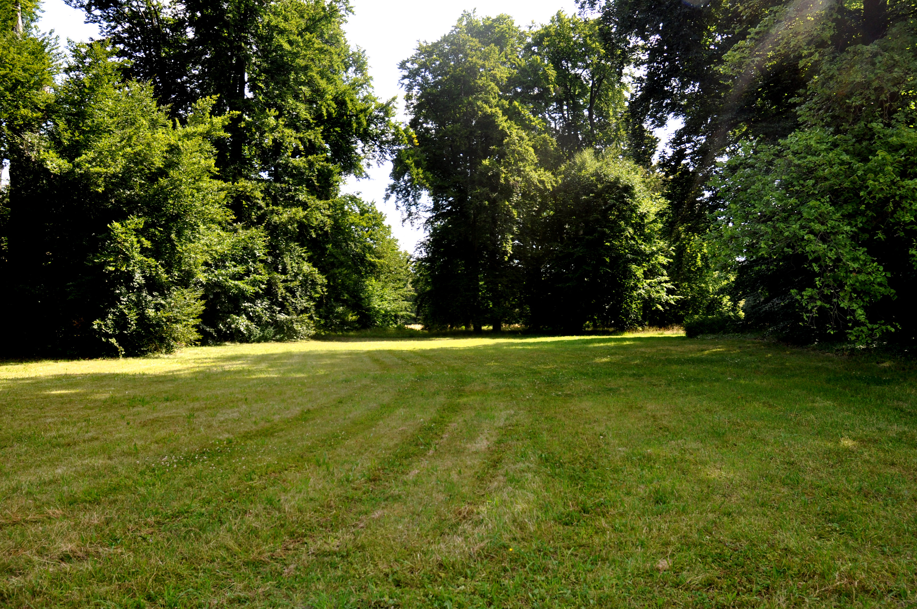 zugewachsener Wiesenraum statt weiter Sichtachse auf den Wiesengrund